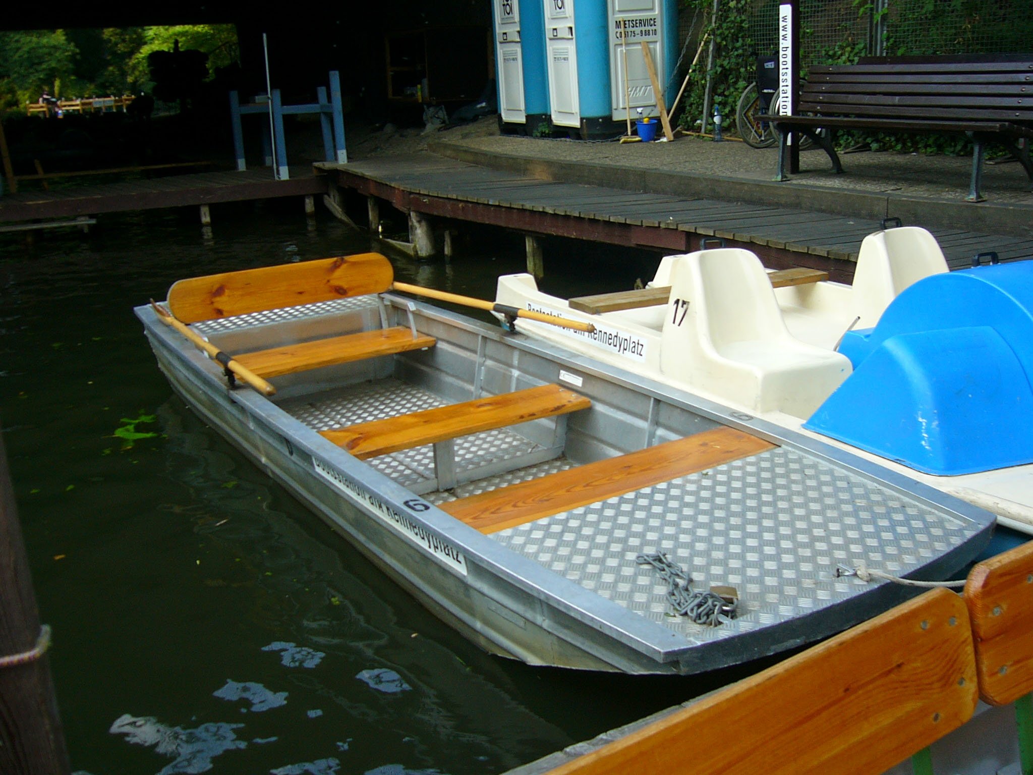 Braunschweig — John-F.-Kennedy-Platz/Kurt-Schumacher-Ring südl.)